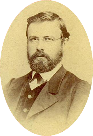 Johannes Frutiger 1836-1899